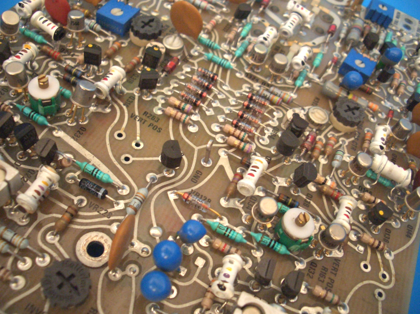 Oscilloscope Tektronix 465